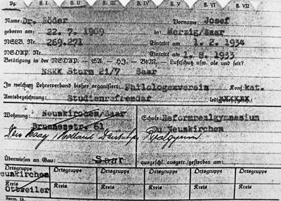 Dr. Josef Röders NS-Lehrerbund-Mitgliedskartei